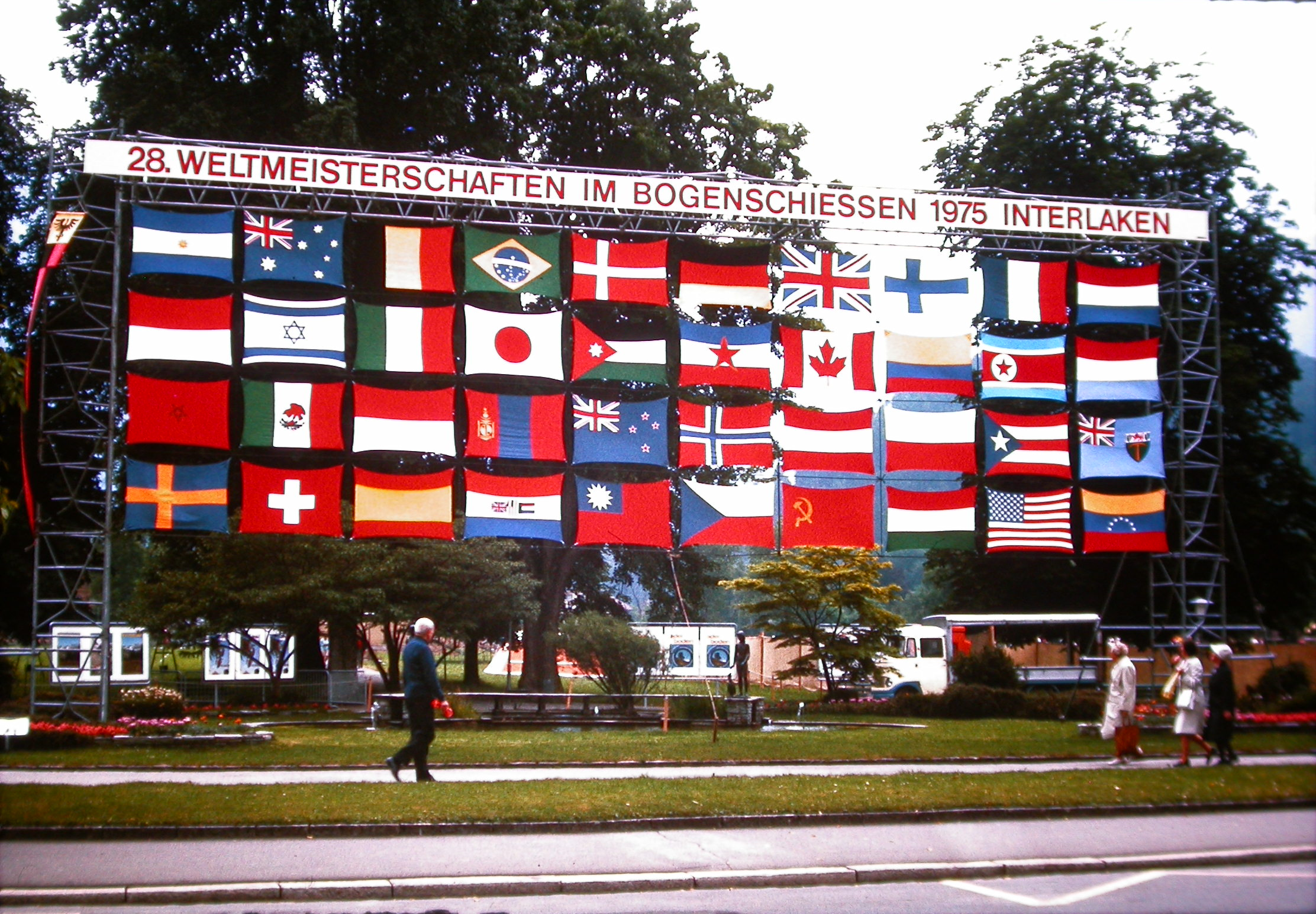 Interlaken 22. Juni 1975